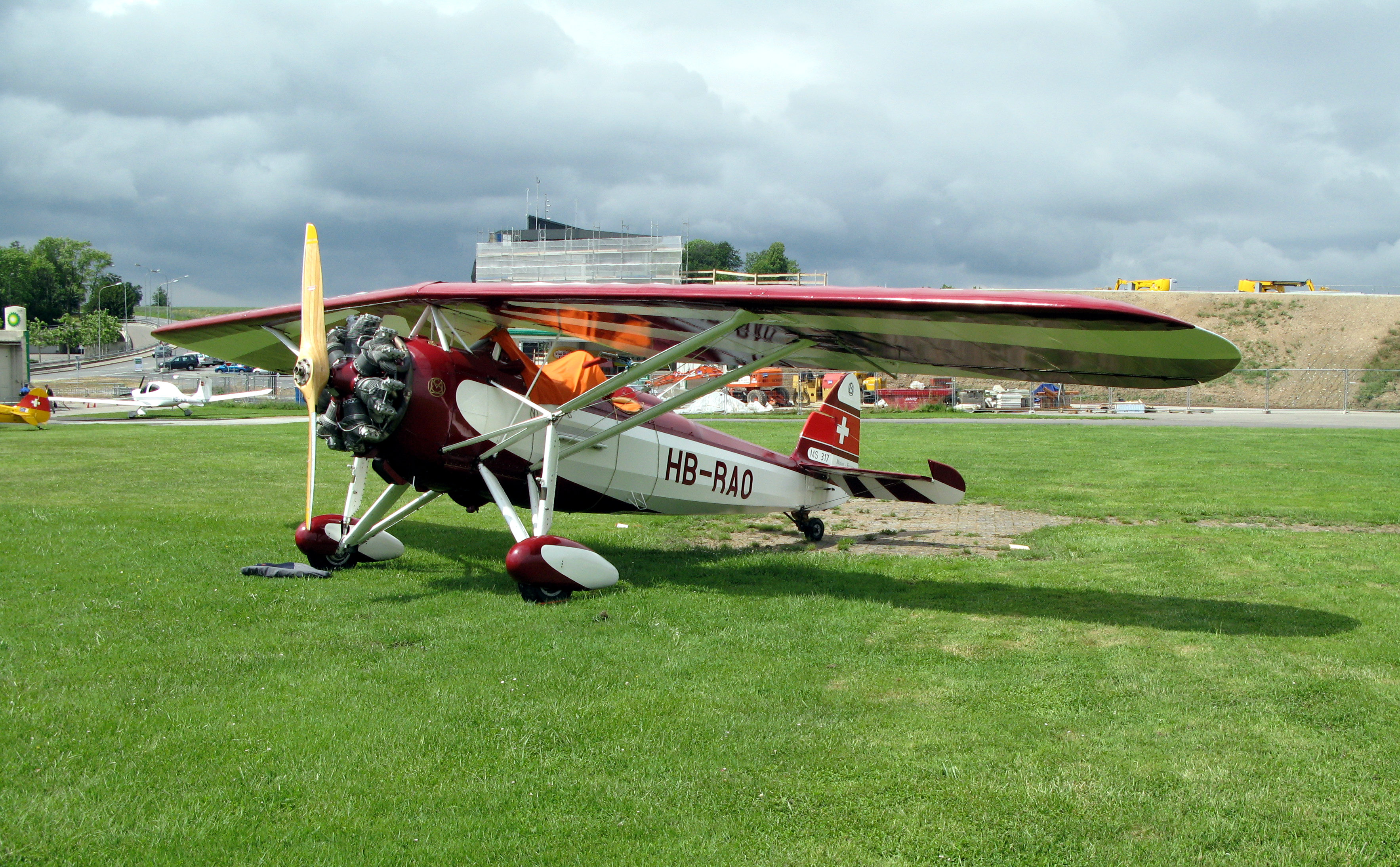 Morane-Saulnier MS-317 built in 1937